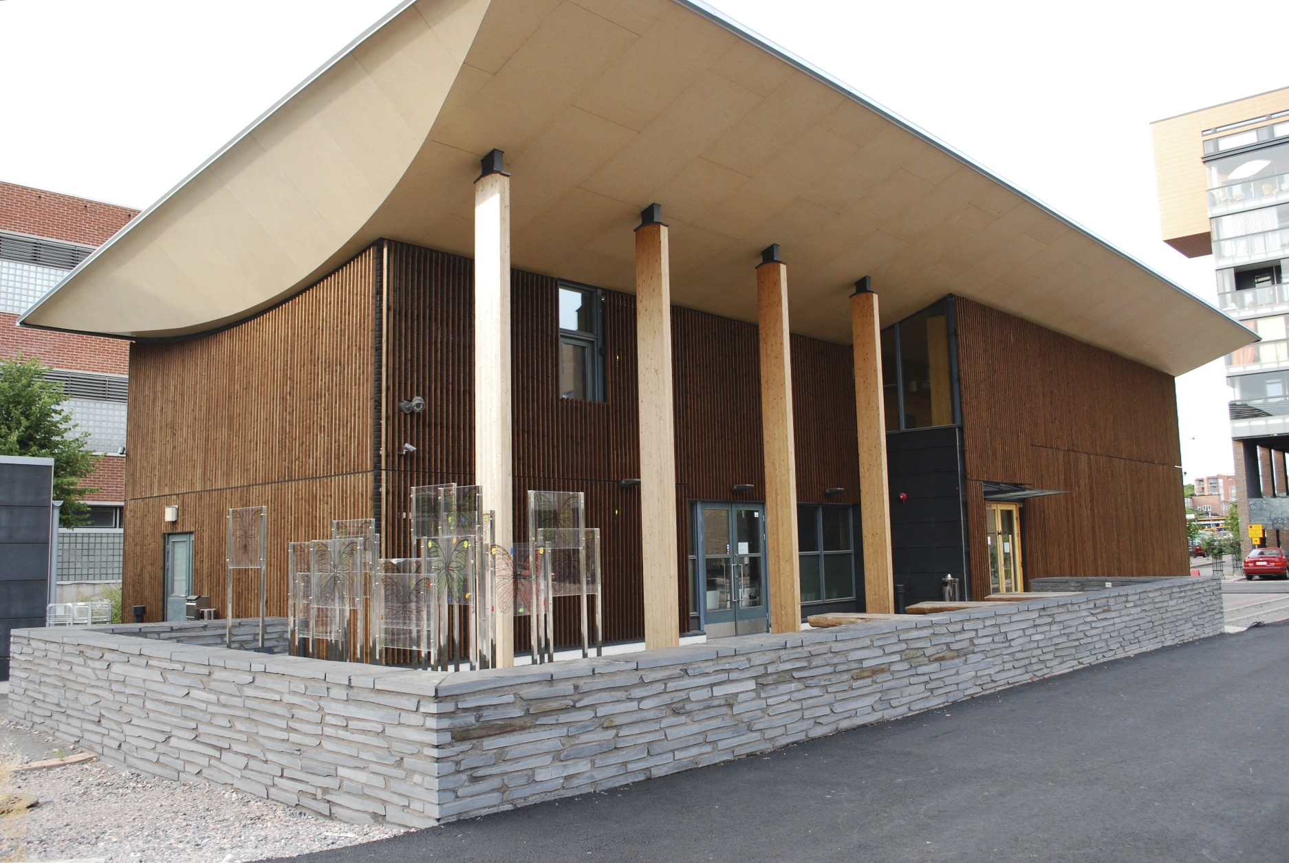 Ammattikorkeakoulu Arcadan opiskelijakunnan kerhotalo Cor-huset.